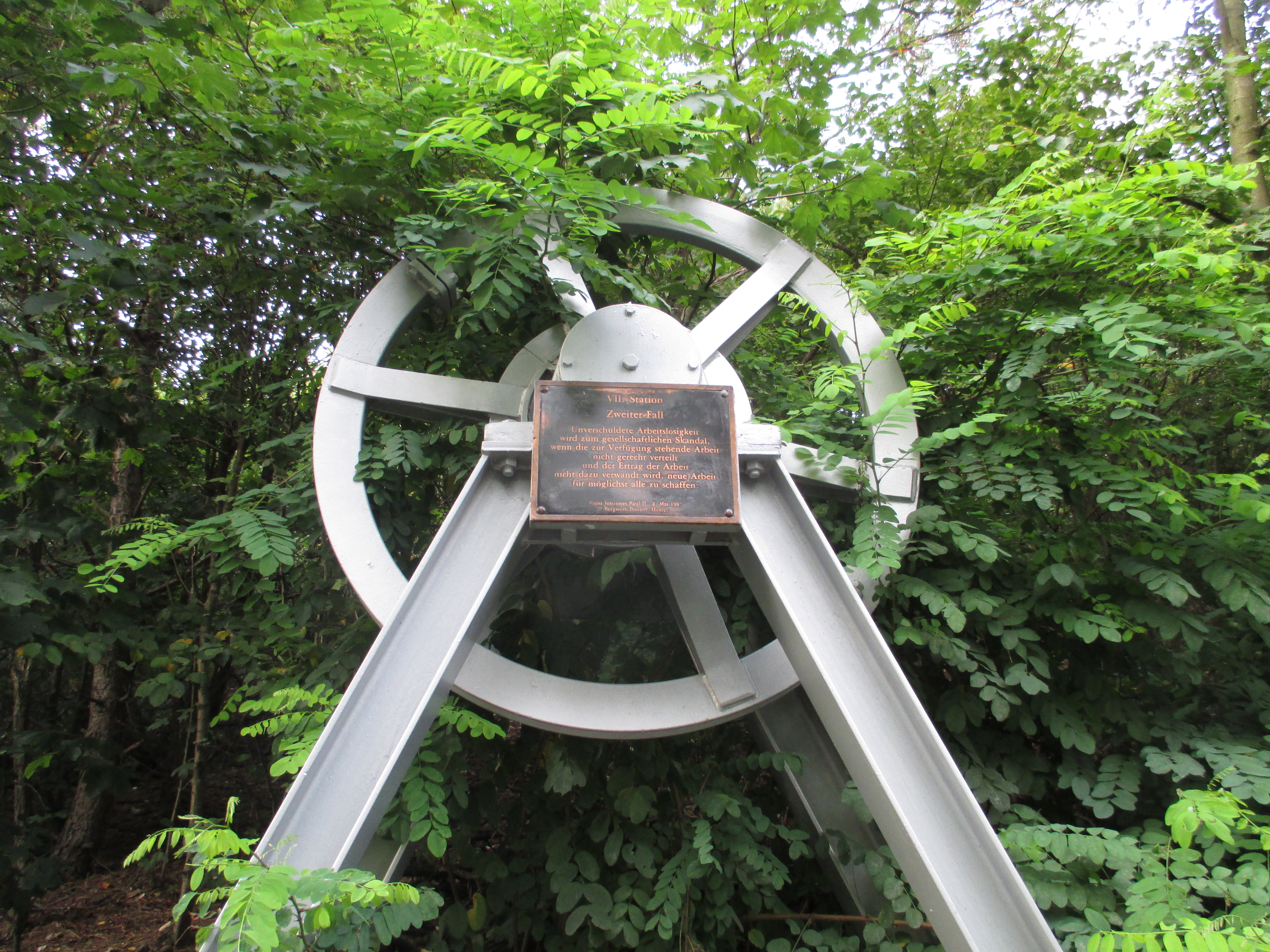 Station 7 des Bergbaukreuzweges an der Halde Haniel in Bottrop.